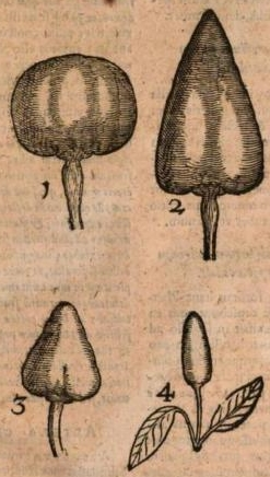 Genera 1-4 capsicorum. Gregorius de Regio, "De varietate capsicorum"